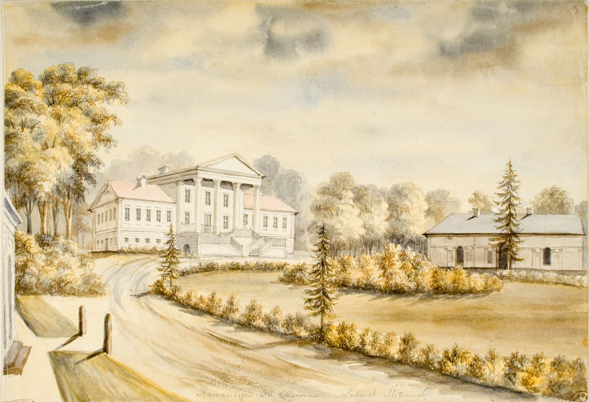 Беларуская (тарашкевіца): Раванічы (Ravaničy), сядзіба Слатвінскіх (Słatvinski)